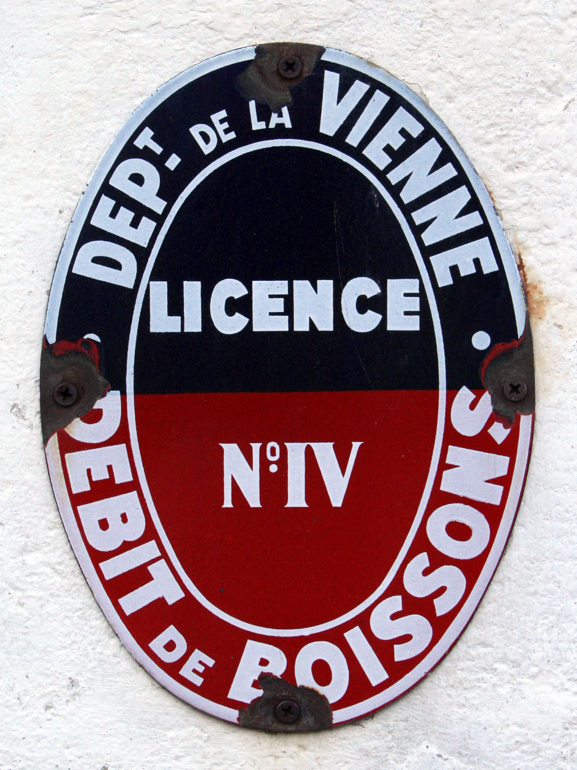 Licence IV de débit de boisson dans la Vienne.